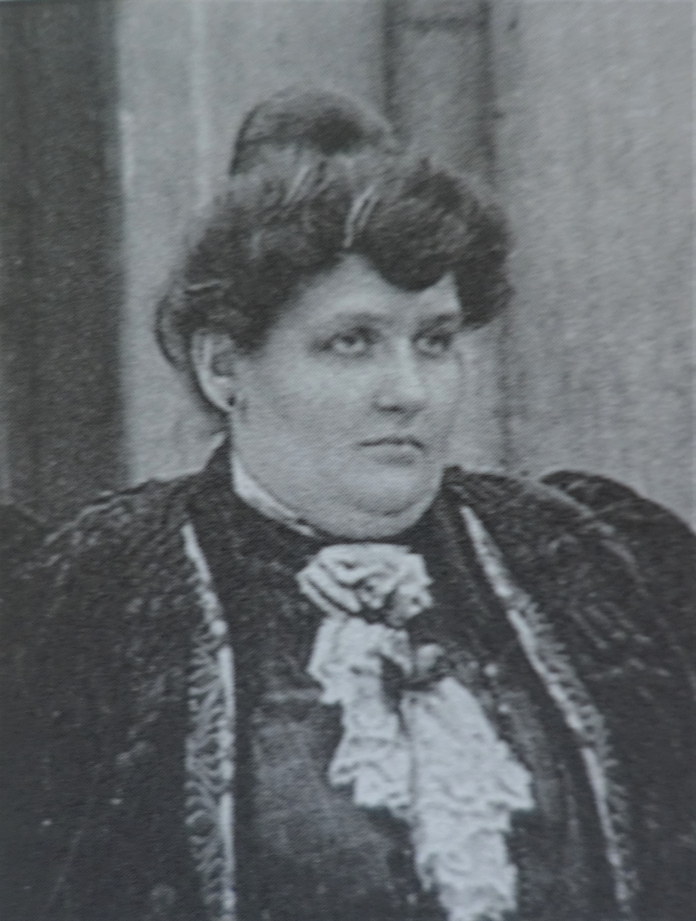 Paula Thiede 1906 Ausschnitt aus einem Gruppenfoto von einem Verbandstreffen